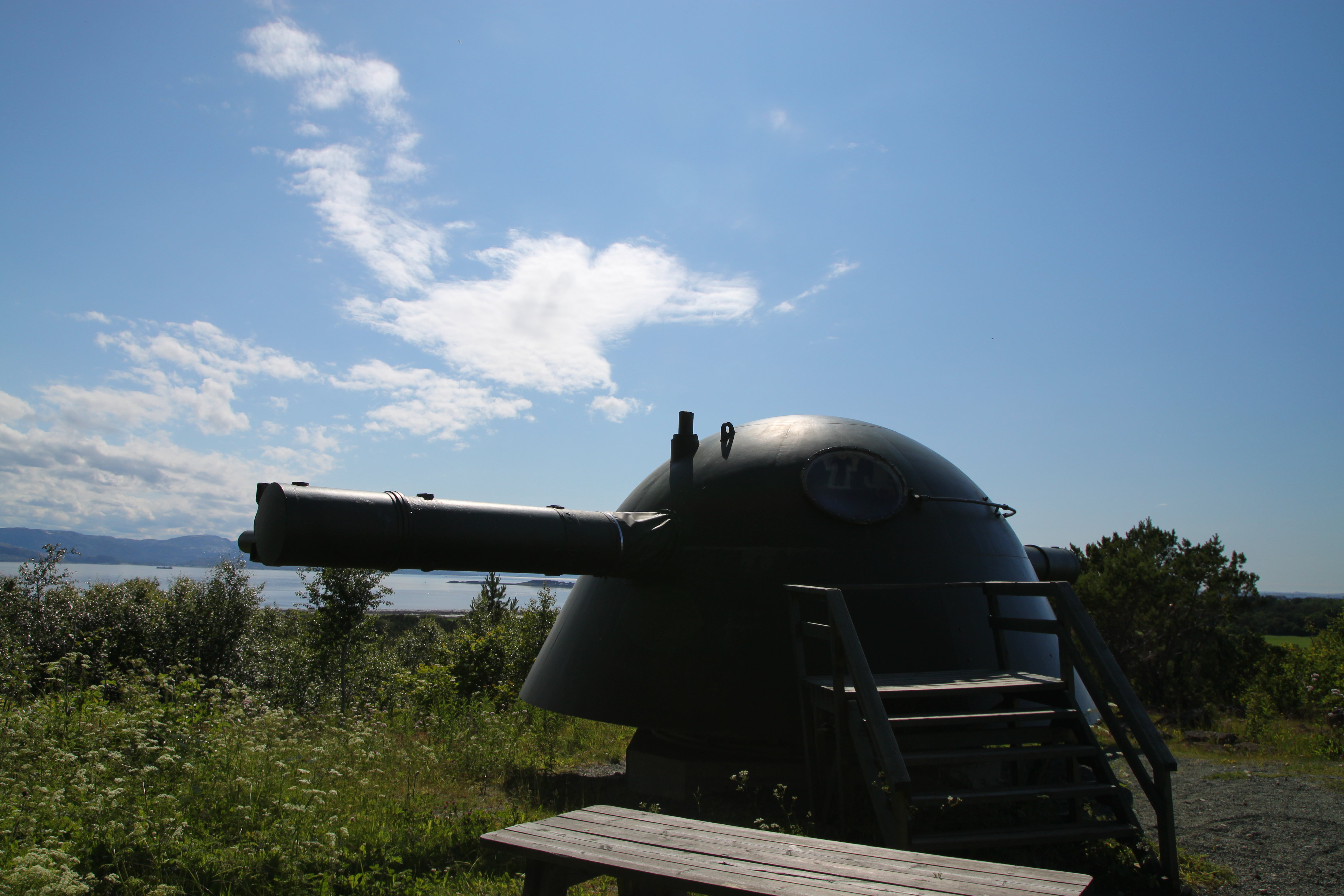 Dieser Entfernungsmesser wurde erst später in Turmnähe verfrachtet. Er befand sich vorher nahe der Feuerleitstelle auf Lorbern, ca. 2,5 km Luftlinie. 28 cm SK C/34 gun at Austrått Fort in Ørland, Norway